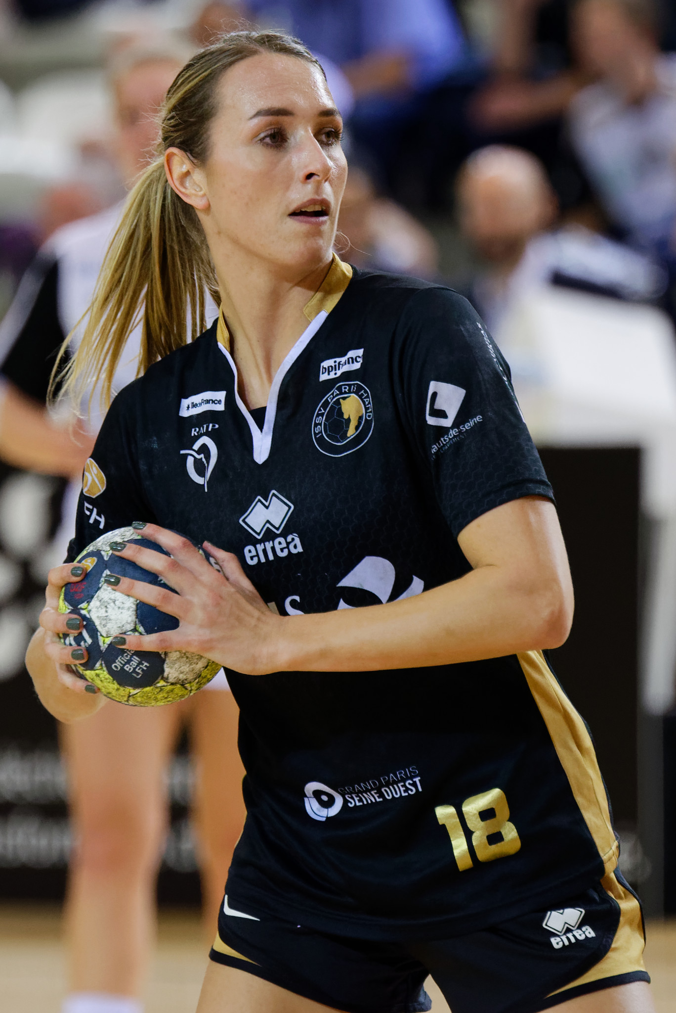 Match de coupe EHF entre Issy Paris Hand et norvégiennes de Glassverket. A Issy Les Moulineaux, le 20 octobre 2017.